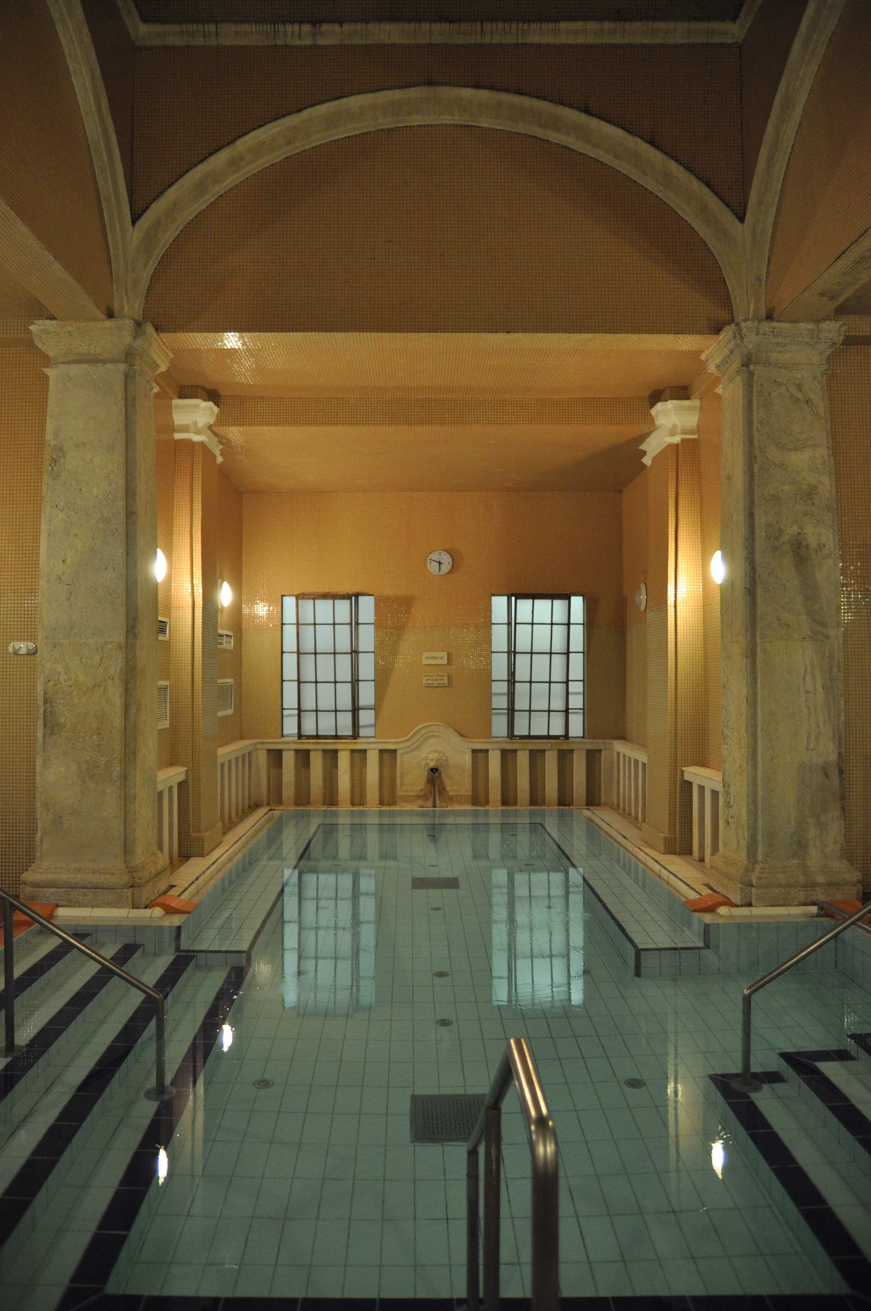 Budapest, Lukács fürdő, termál részleg, 32 °C fokos medence